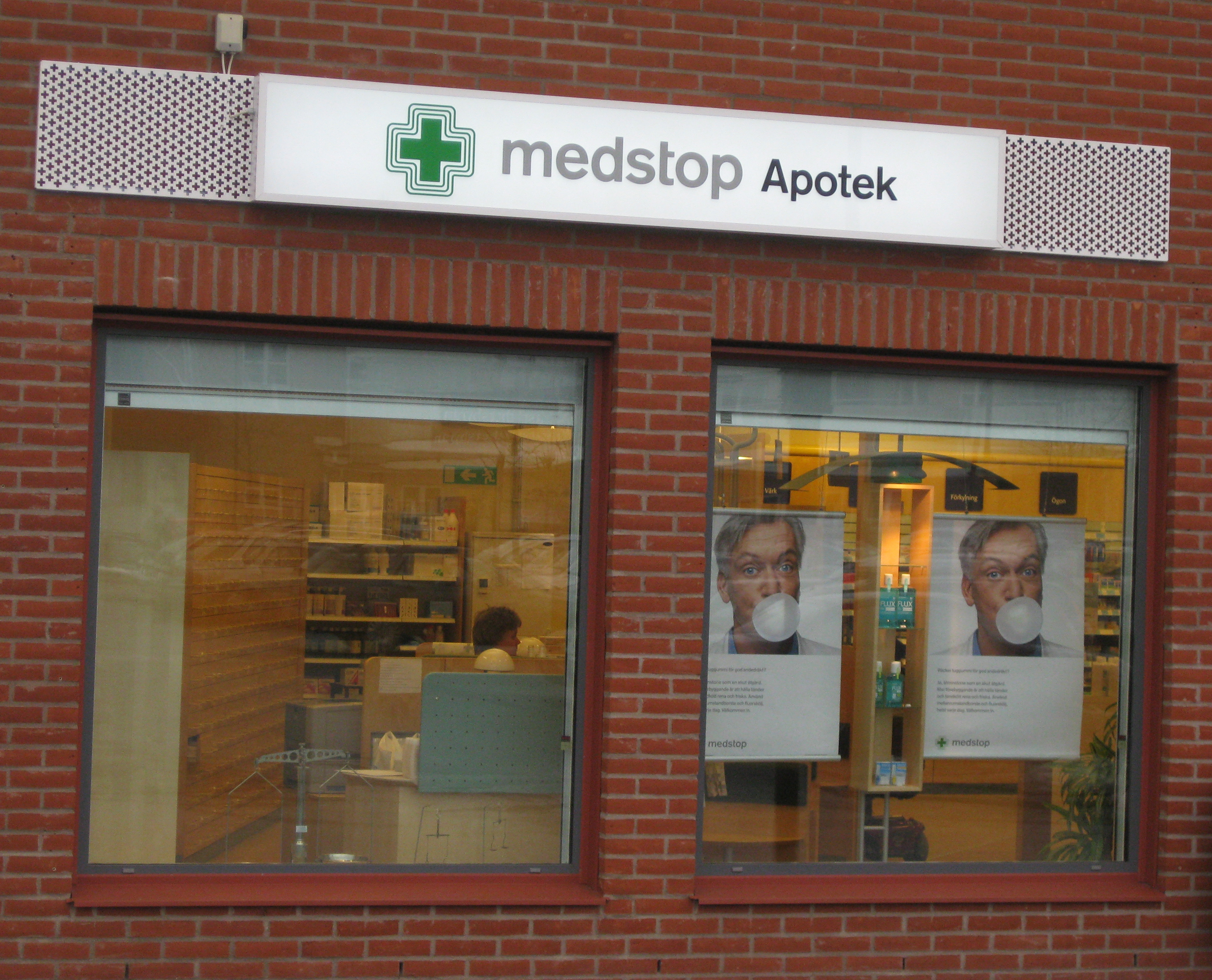 Apoteket Medstop i Mölnlycke.